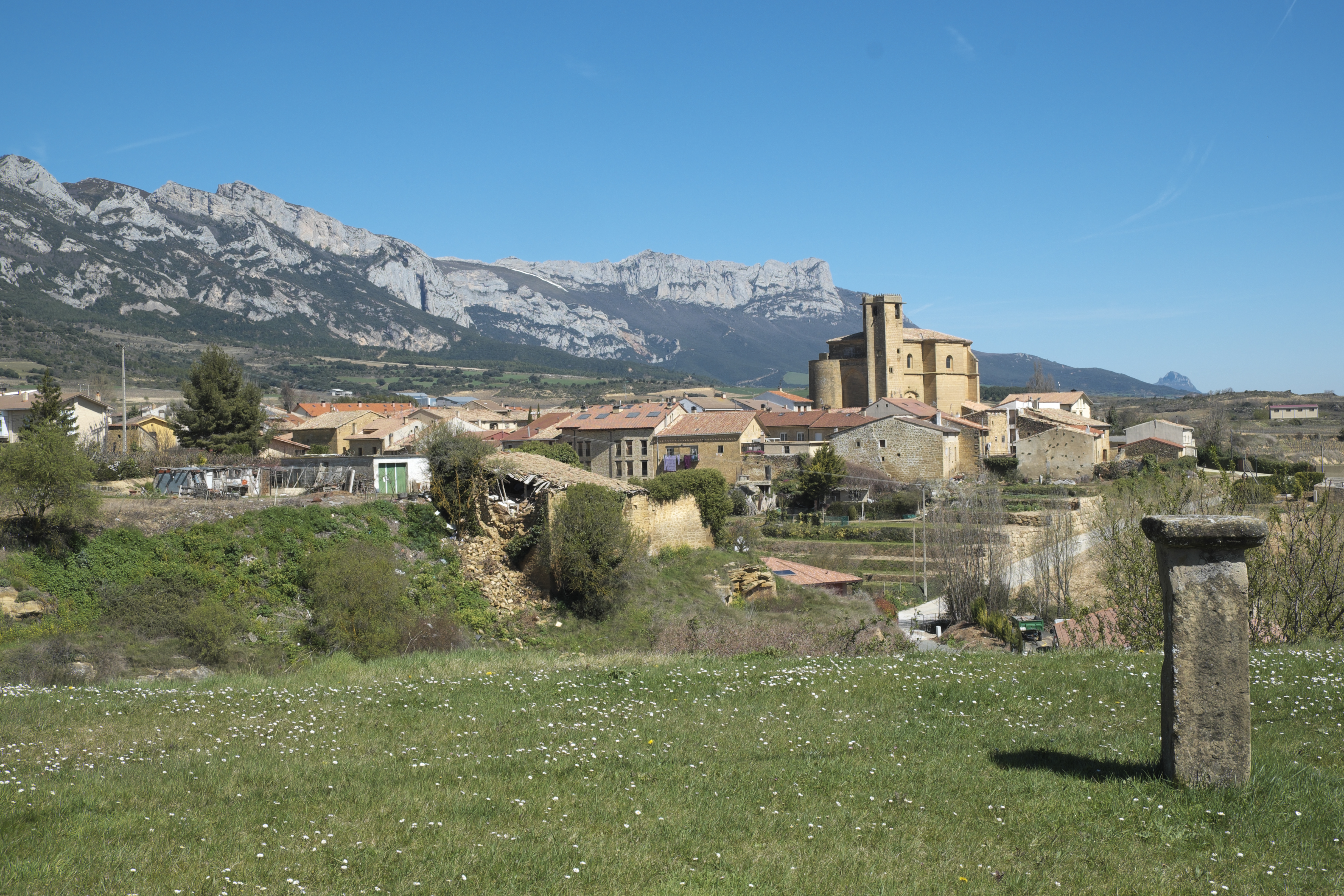 Samaniego in der Provinz Álava in der Autonomen Gemeinschaft Baskenland (Spanien)